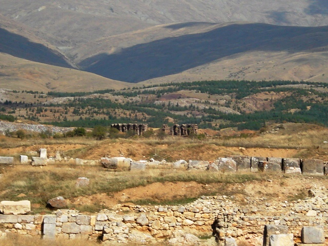 Dosya yükleyen kullanıcıya aittir. Isparta ilinin Yalvaç ilçesinde bulunan Antiocheia in Psidia adlı antik kentin uzaktan görünümü.